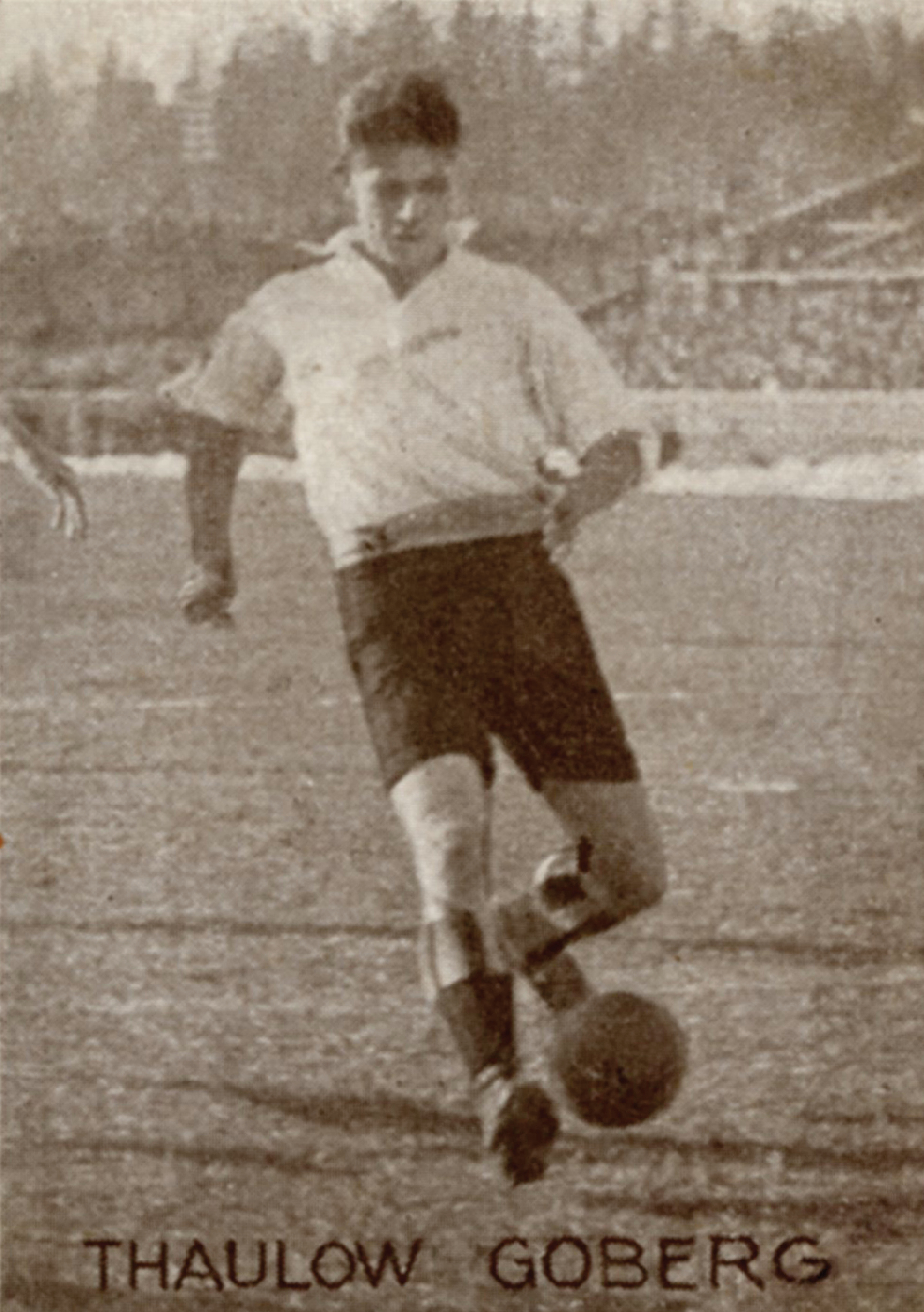 Format: Samlekort Dato / Date: ca. 1930 (dokumentet) Fotograf / Photographer: Ukjent Wikipedia: Thaulow Goberg (1897 - 1962) Eier / Owner Institution: Trondheim byarkiv, The Municipal Archives of Trondheim Arkivreferanse / Archive reference: Sportsklubben Freidig: Sigarettfoto ca. 1930 (Løpenr. 75) F23977 Tekst på baksiden: Thaulow Goberg, Norges og den berømte Skienklub Odds fænomenale back. Goberg hører til blandt Odds og Norges mest fremragende fotbalspillere, og han har forsvaret Norges farver i en række landskamper, og har selv hjulpet til at skaffe sin klub, Odd, flere Norgesmesterskap. Merknad: Disse samlekortene med bilder av norske og internasjonale idretthelter fulgte med i sigarettpakker på 1920 og 30-tallet - derav tobakksreklamen på baksiden. Samlekortene kommer fra Sportsklubben Freidigs arkiv, og inneholder nærmere 90 unike kort pent plassert i et samlealbum. Samleren var den senere skipsmegler Finn Følling (1914 – 1985).